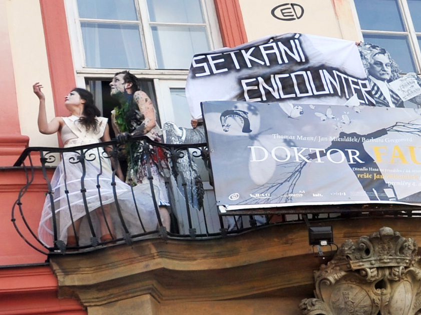 Banner festivalu SETKÁNÍ/ENCOUNTER na budově Divadla Husa na provázku